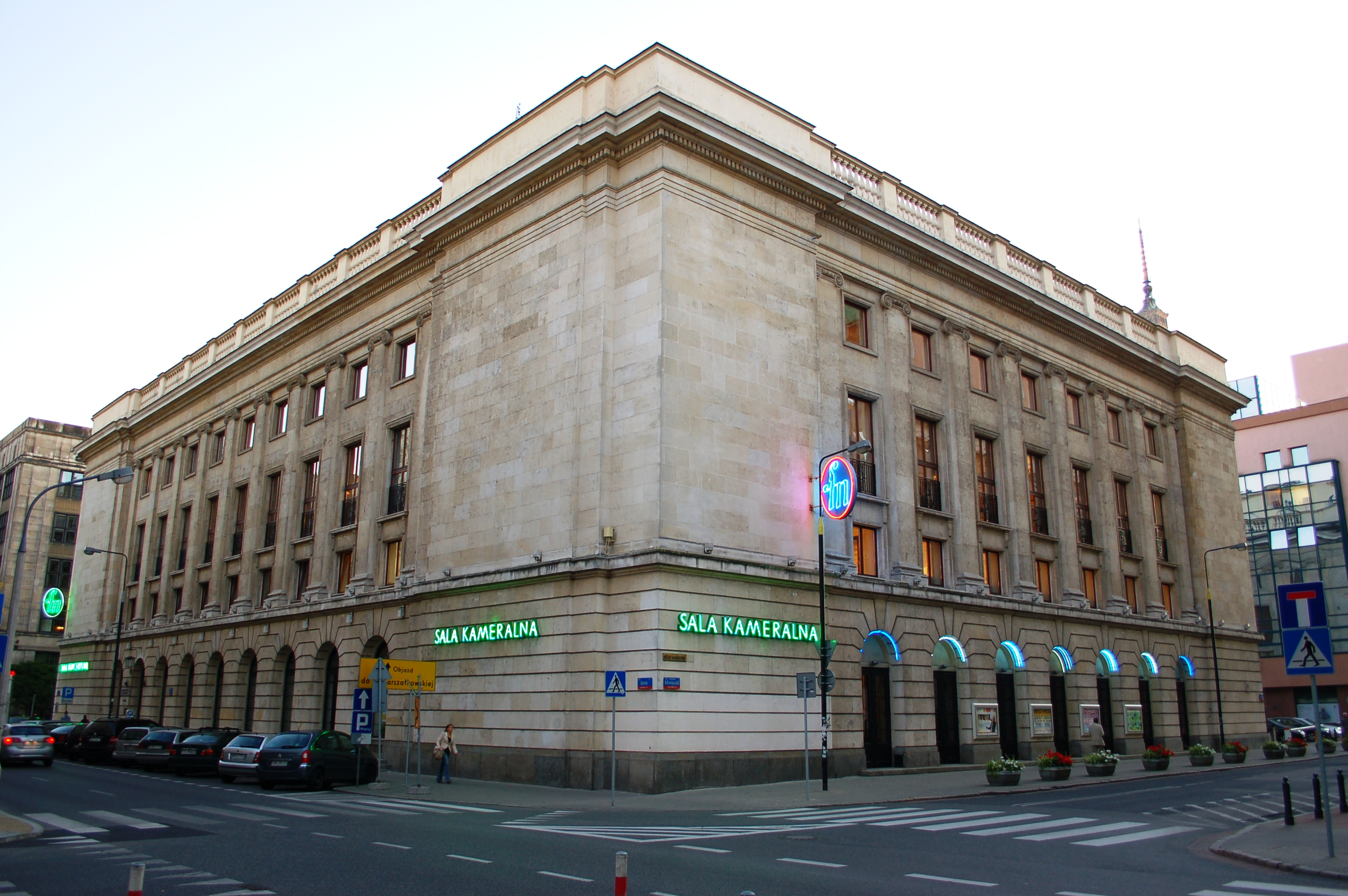 Warschau, Innenstadt